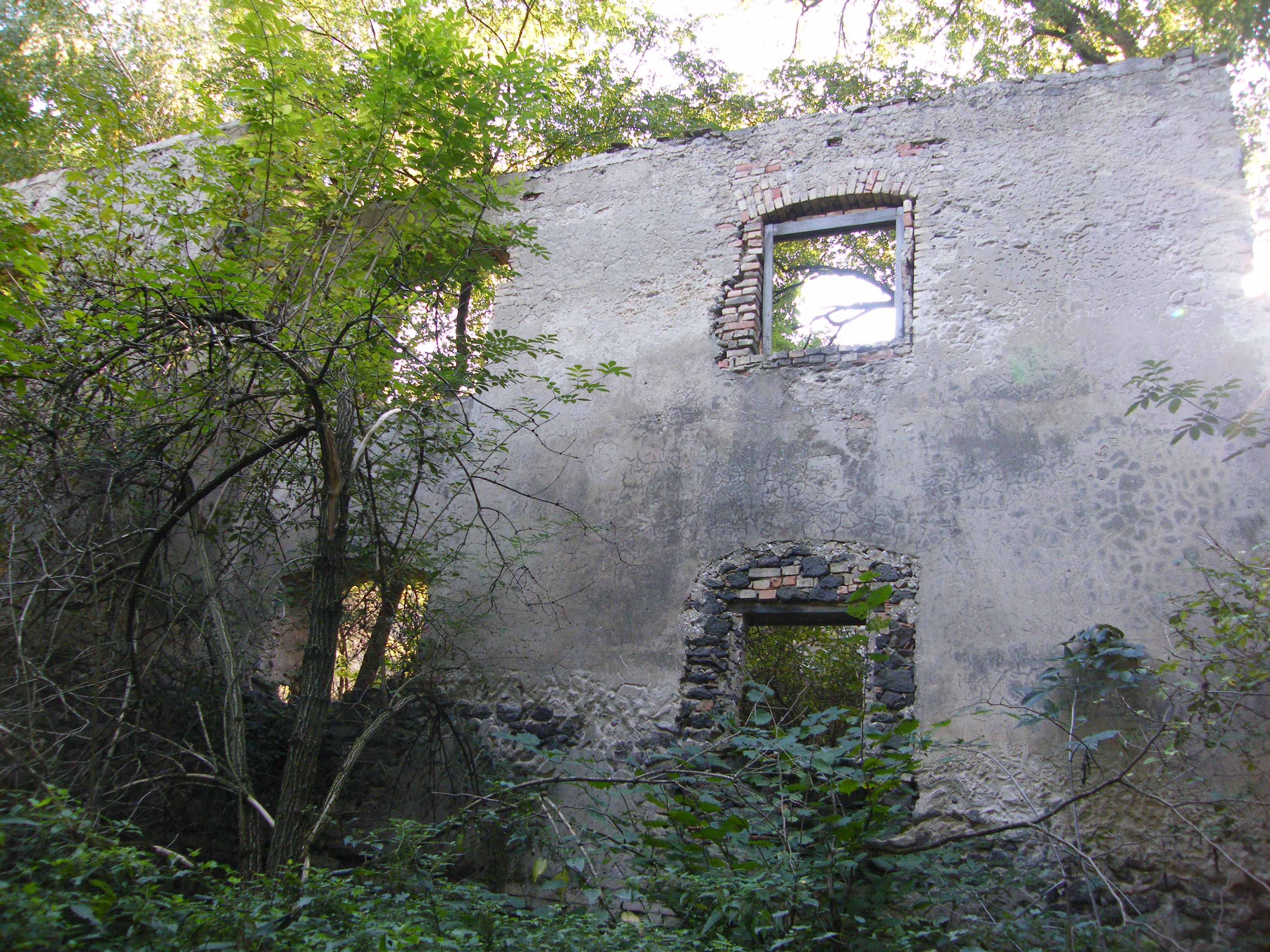 Hertelendy kastélyrom